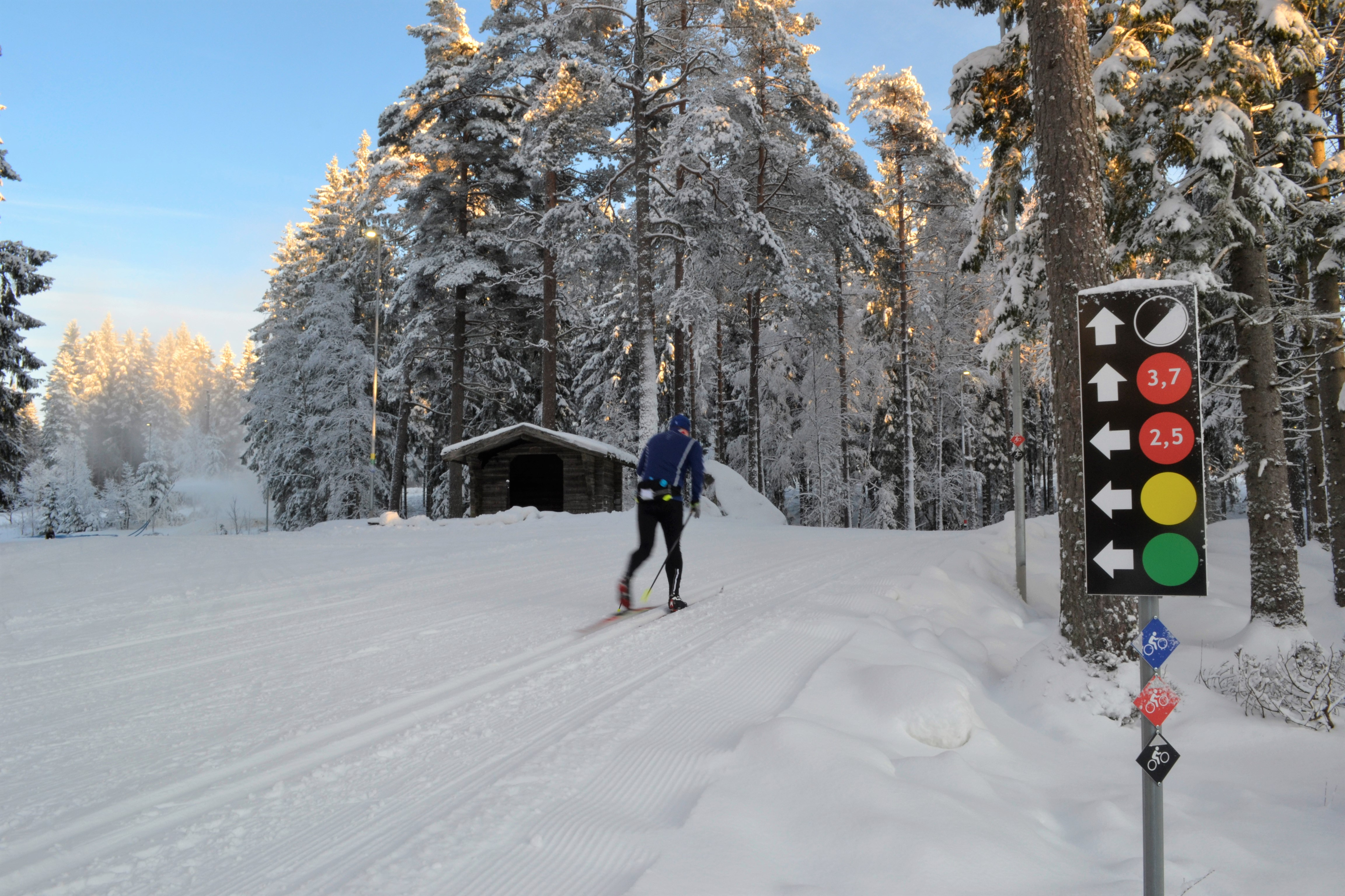 Bild från Lassalyckan i Ulricehamn som är en idrott- och friluftsanläggning. På Lassalyckan finns olika motions- och skidspår.